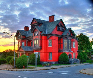 Greene Mansion, Amsterdam, NY.